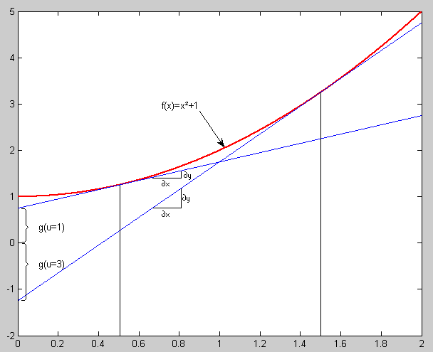 Graphische Interpretation der Legendre-Transformation